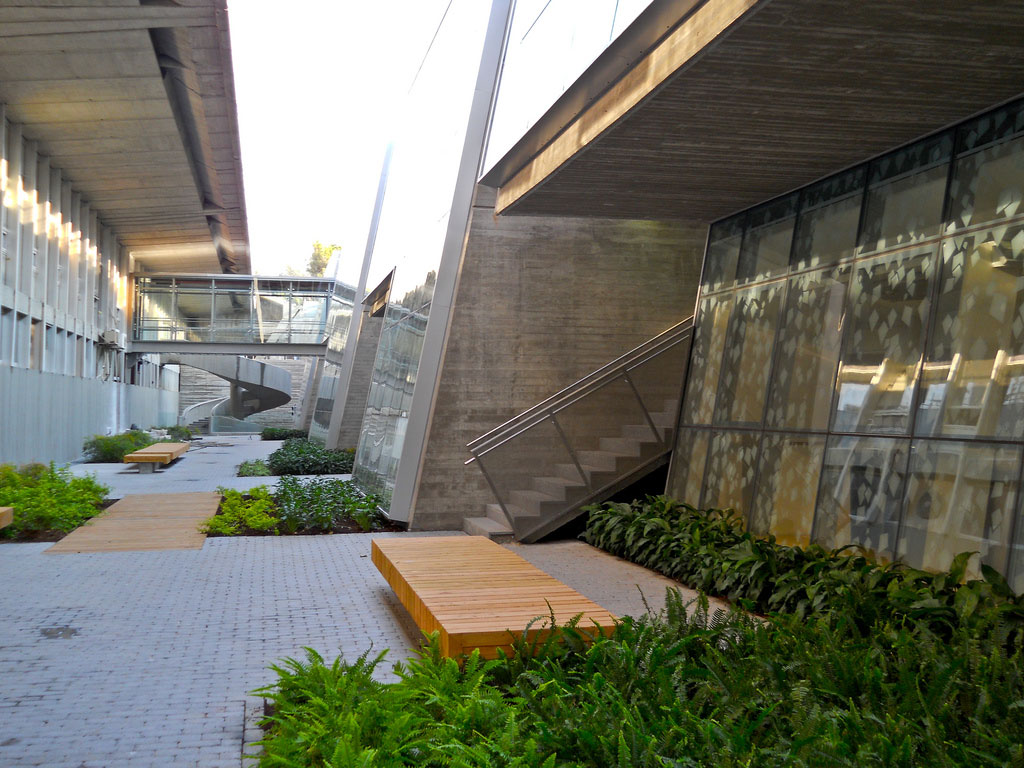 הכניסה והפטיו באגף החדש